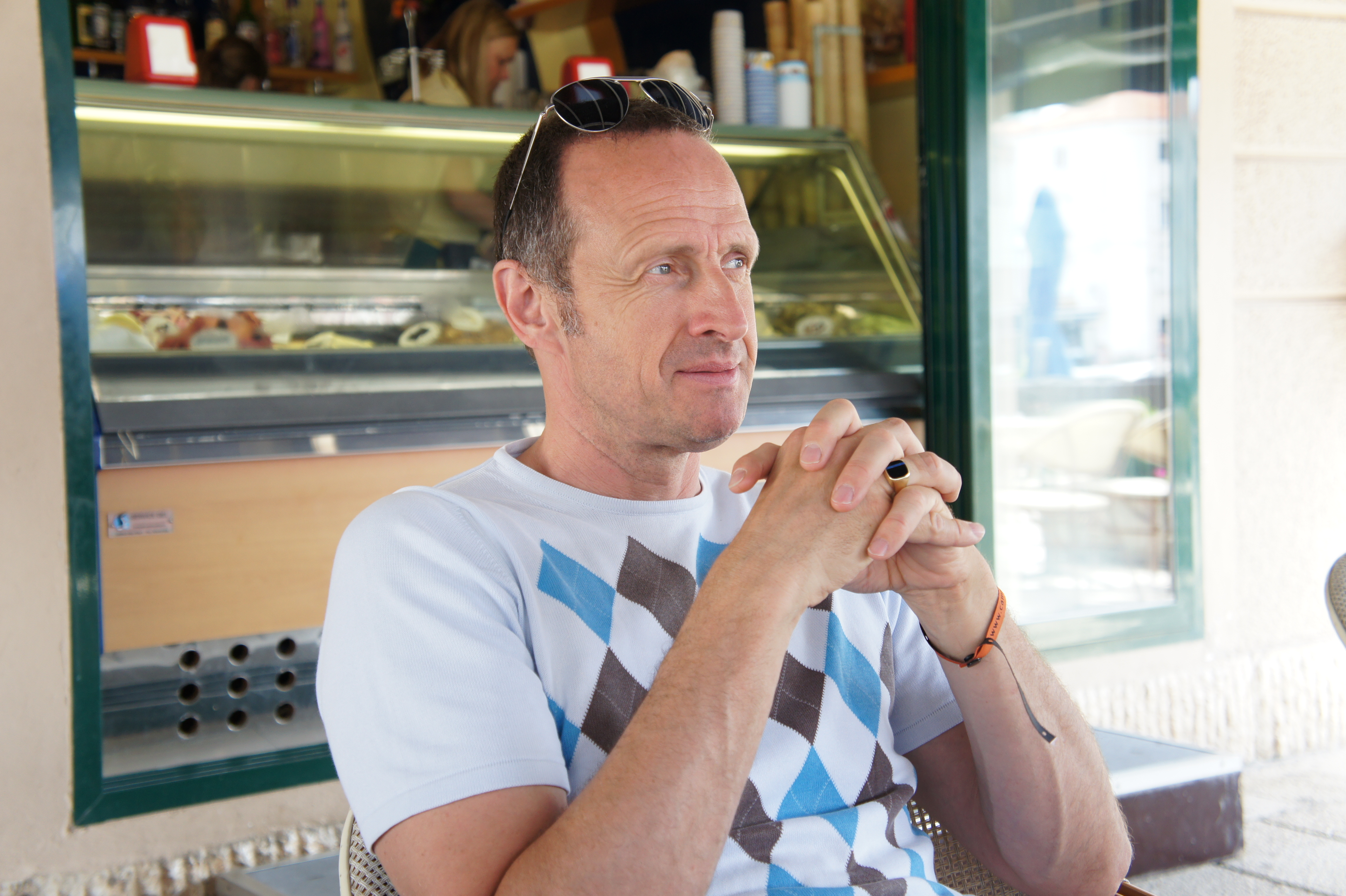 Nederlands stemacteur, onder andere bekend van de stem van Bob de Bouwer, maar van de TomTom-navigatie